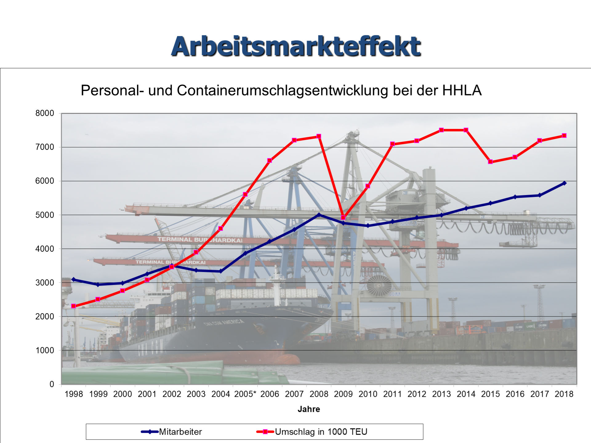 Personal- und Umschlagentwicklung der HHLA lt. Geschäftsbericht